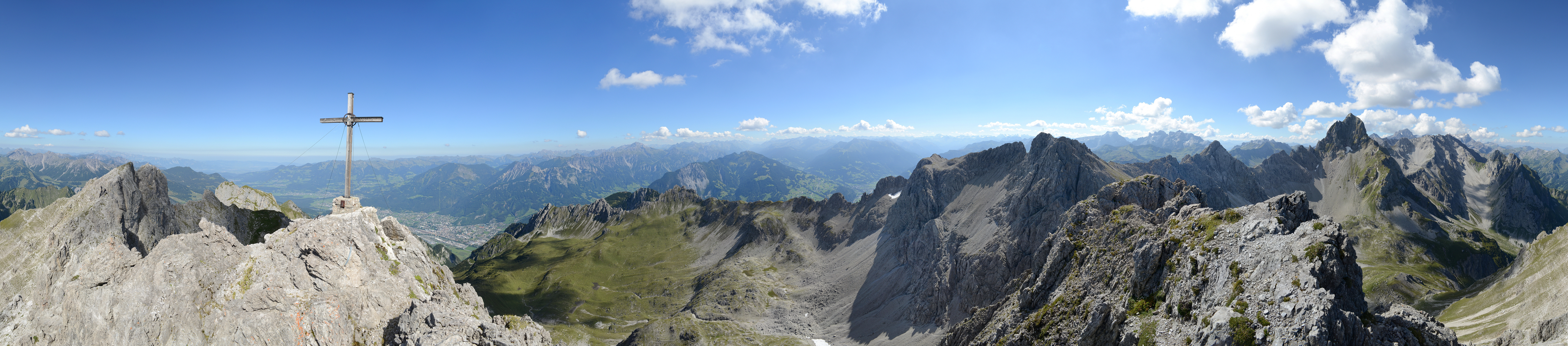 360° Panorama auf der 2.438 m ü.A. gelegenen Gottvaterspitze. Sie sitzt nördlich der Zimba 2.643m im Sarotlatal und wird als Hausberg der Bludenzer bezeichnet. Zwischen der Zimba und der Gottvaterspitze liegt der Sattel "Eisernes Törle" gefolgt vom Großen Valkastiel 2.449m und dem Steintälikopf 2.443m. Der Aufstieg führt über das Sarotlatal vom Bürserberg oder Brand kommend in ca. 2,5 Stunden auf die Sarotlahütte. Von dort führen die Wege entweder zum Zwölferkopf, zu den Sarotlahörner, der Zimba, dem Gr. Valkastiel oder zur Gottvaterspitze. Für die Touren müssen ca. 4,5 Stunden für den Aufstieg und die Zeit für den Abstieg geplant werden. Gute Kondition und Trittsicherheit sind vorausgesetzt. NOTE: This image is a panorama consisting of multiple frames that were merged or stitched in software. As a result, this image necessarily underwent some form of digital manipulation. These manipulations may include blending, blurring, cloning, and colour and perspective adjustments. As a result of these adjustments, the image content may be slightly different from reality at the points where multiple images were combined. This manipulation is often required due to lens, perspective, and parallax distortions.